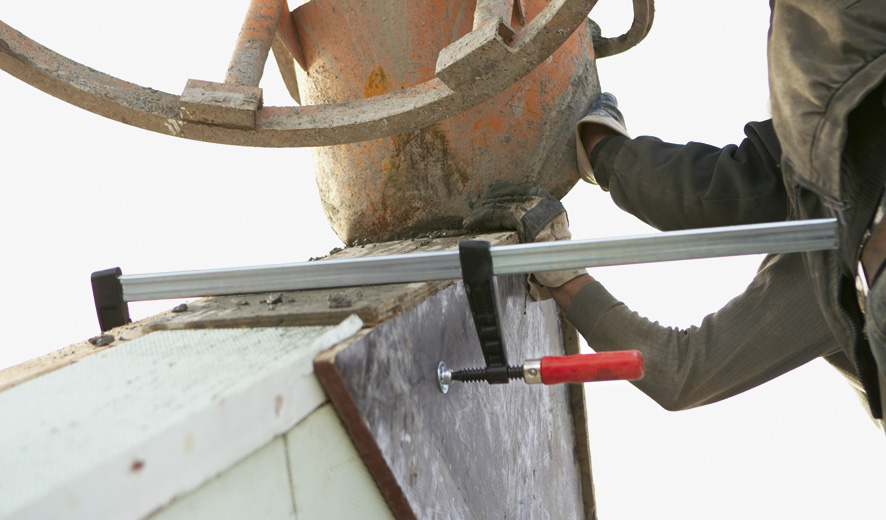 Schraubknecht in Anwendung